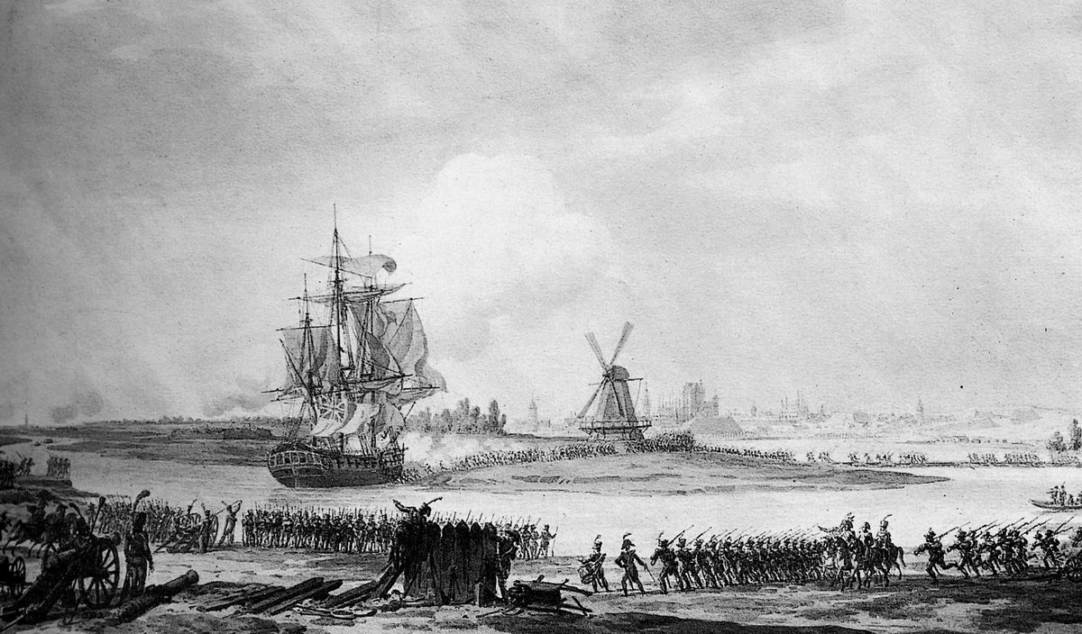 Surrender of HMS Dauntless